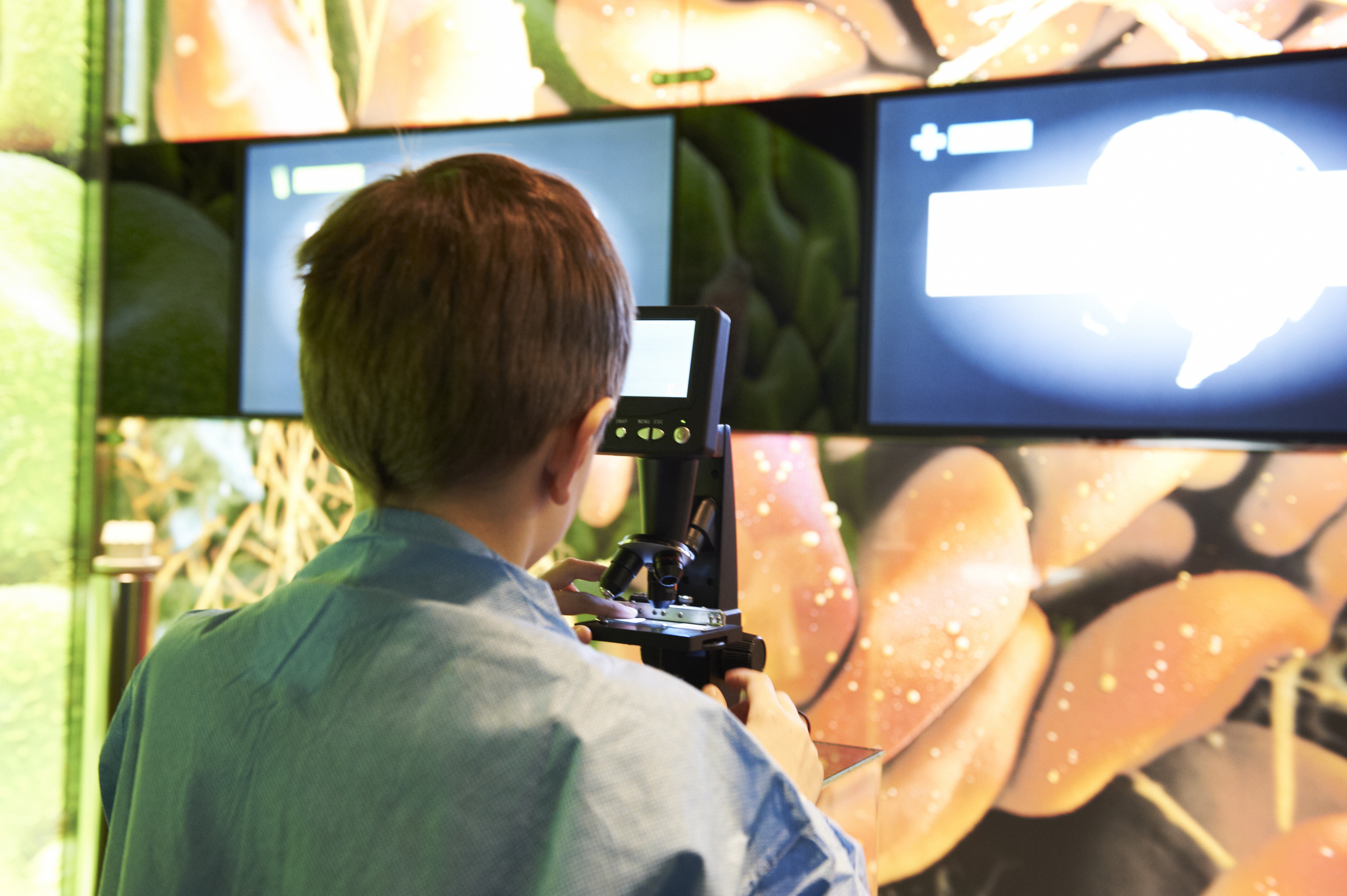 mikroskop